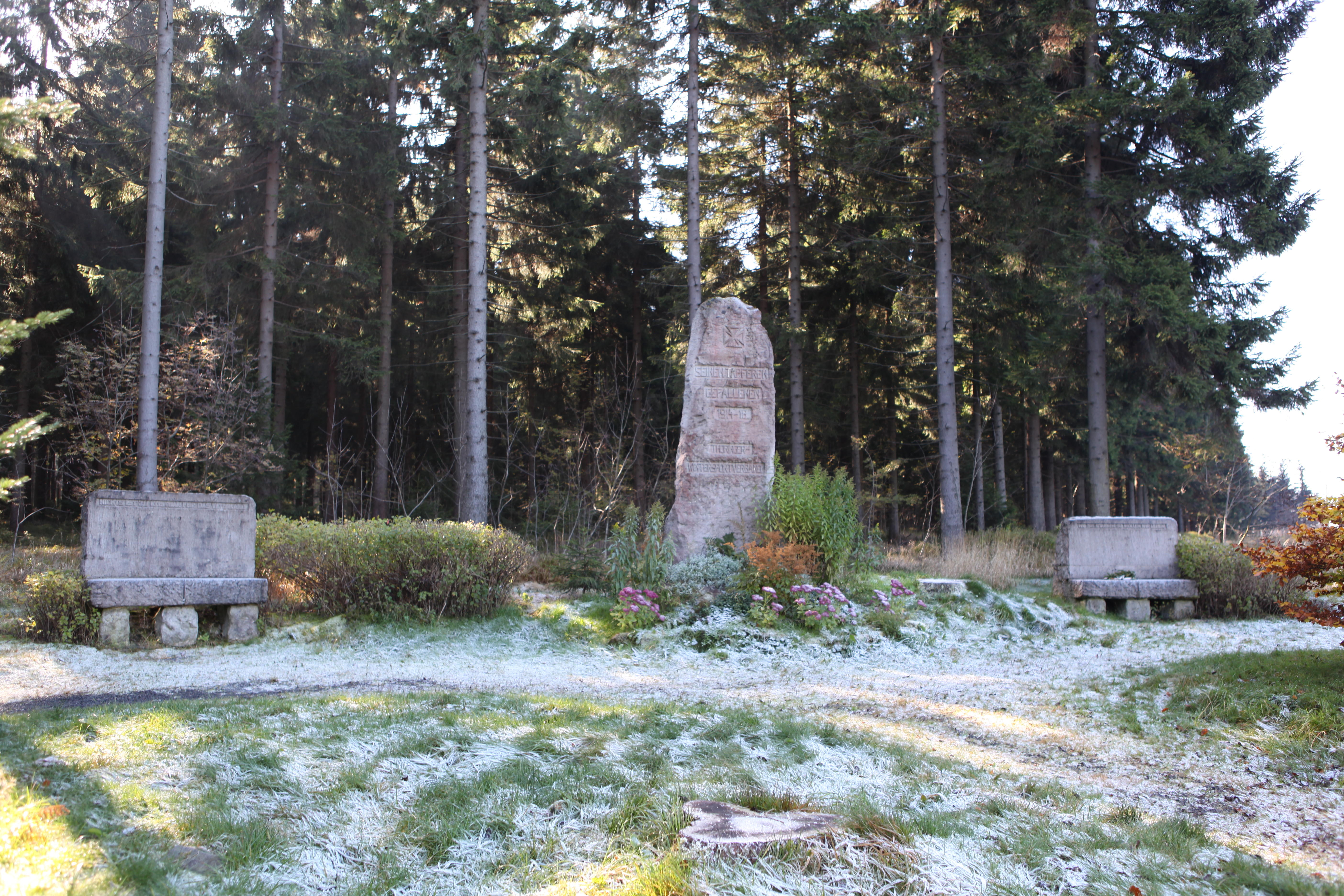 Denkmal für die im 1. Weltkrieg Gefallenen des Thüringer Wintersportverbandes, 1921, von R. Holland, Ernstthal (OT von Lauscha), an Kreuzung Rennweg mit Straße Ernstthal-Piesau